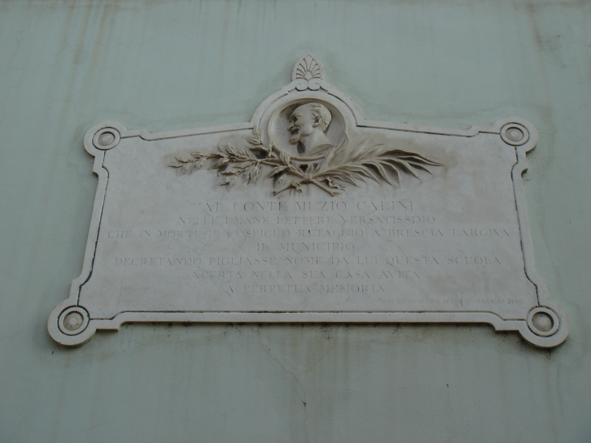 Palazzo Calini ai Fiumi (Brescia). Lapide del 1880 che ricorda il lascito del palazzo da parte del Conte Muzio Calini al Comune.